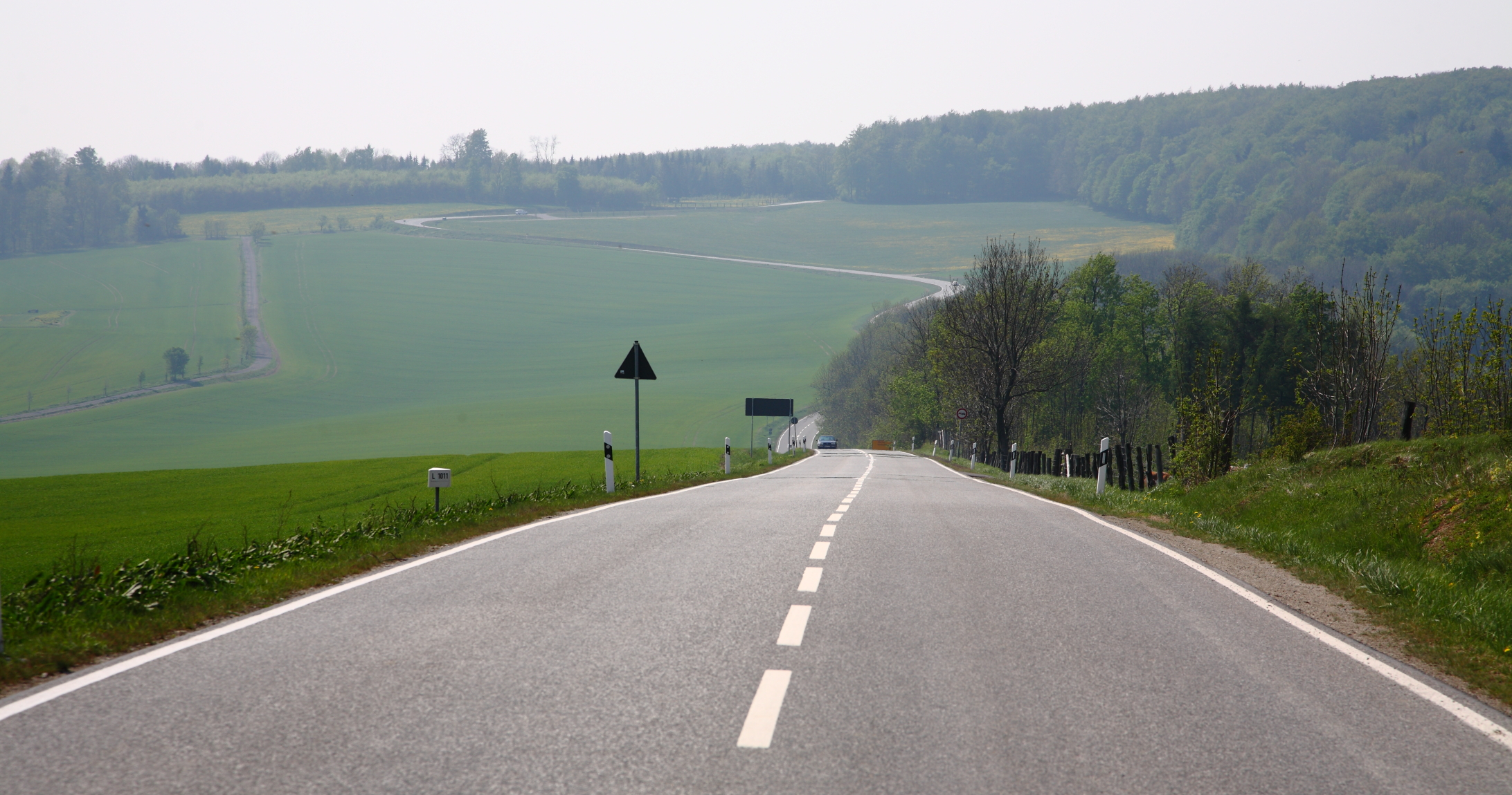 Die Landstraße L1012 am Sonnenstein Richtung Kirchohmfeld und Worbis (rechts der Straße erstreckt sich der Schwarzenberg).